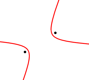 hyperbola